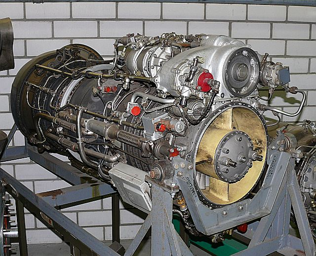 Klimow TW-3-117, eigenes Bild